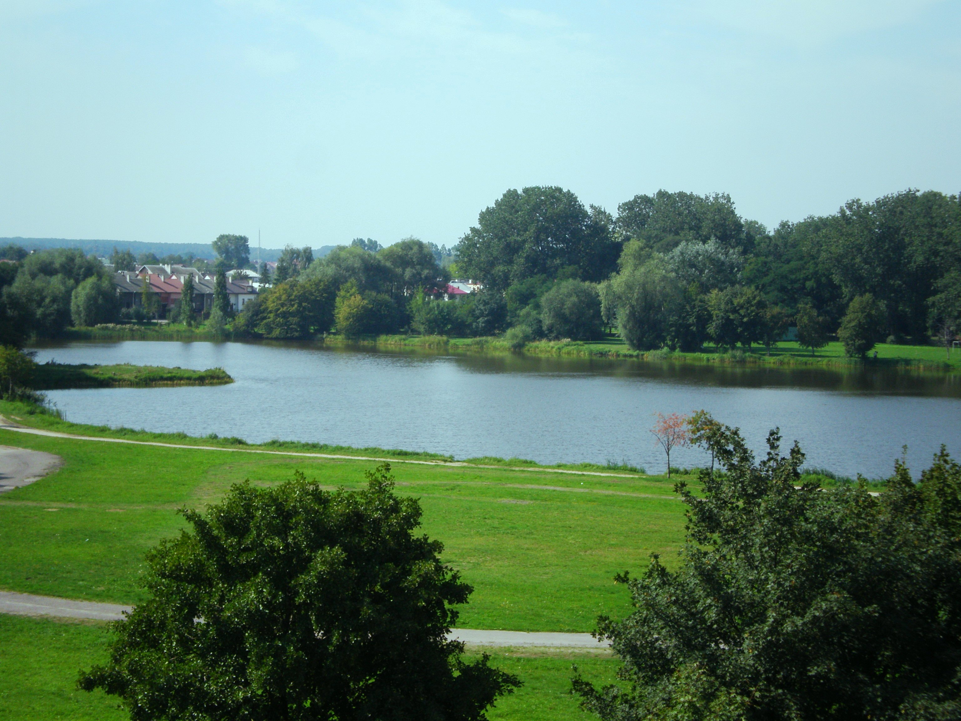 Jezioro (zalew) Rutki w Płońsku